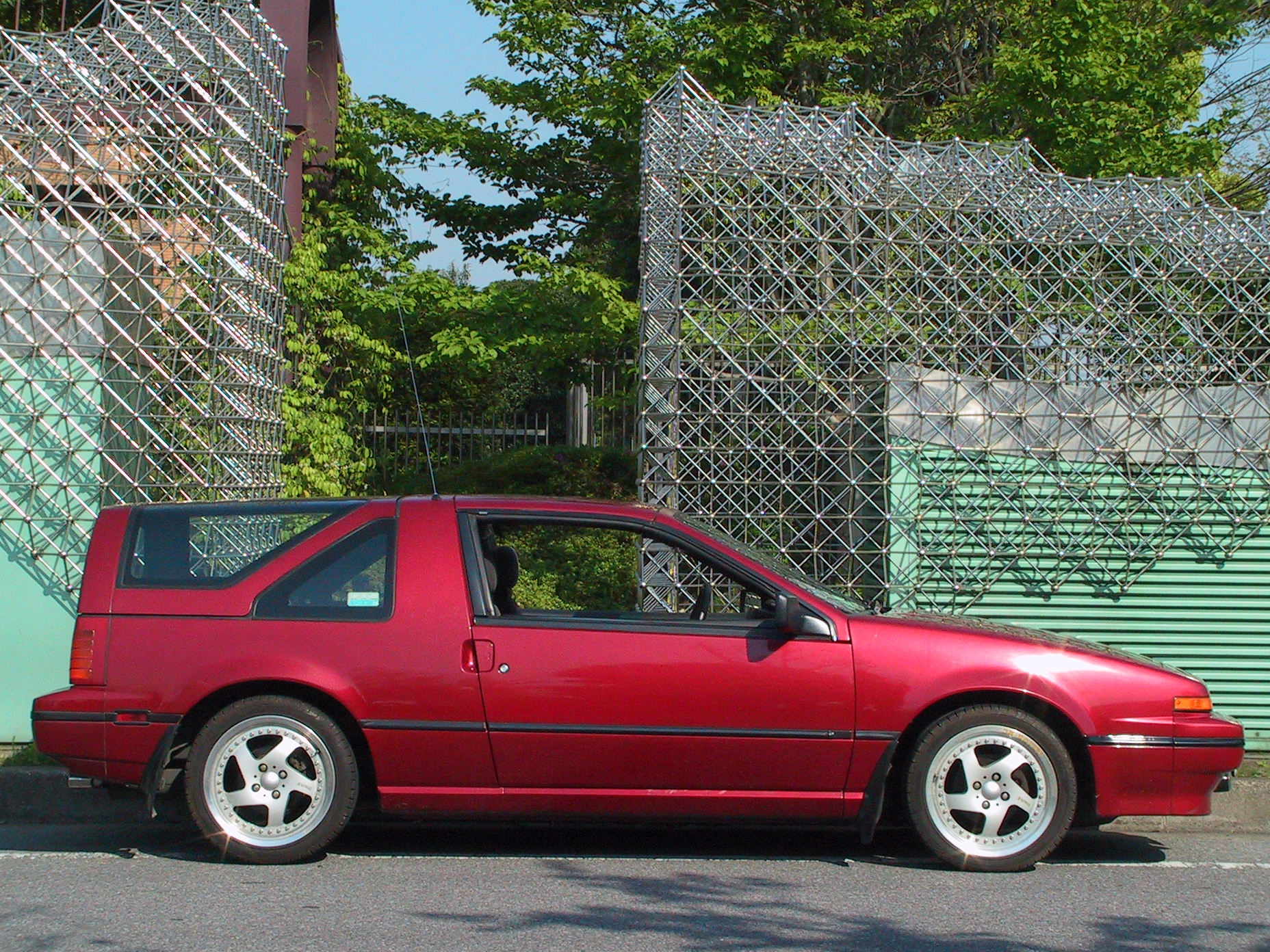 Nissan EXA Canopy L.A.ver. Type-SE